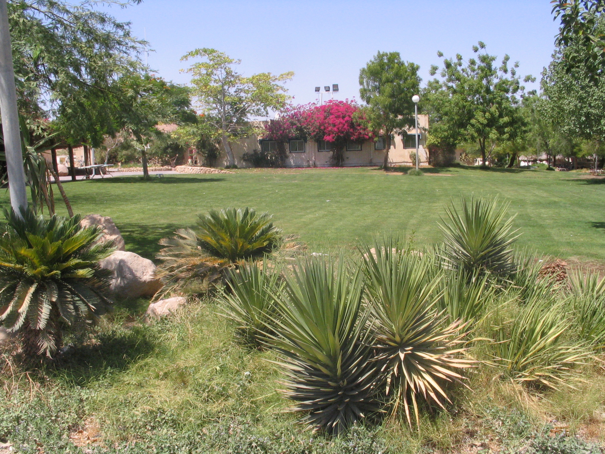 Kibbutz Lotan, Israel